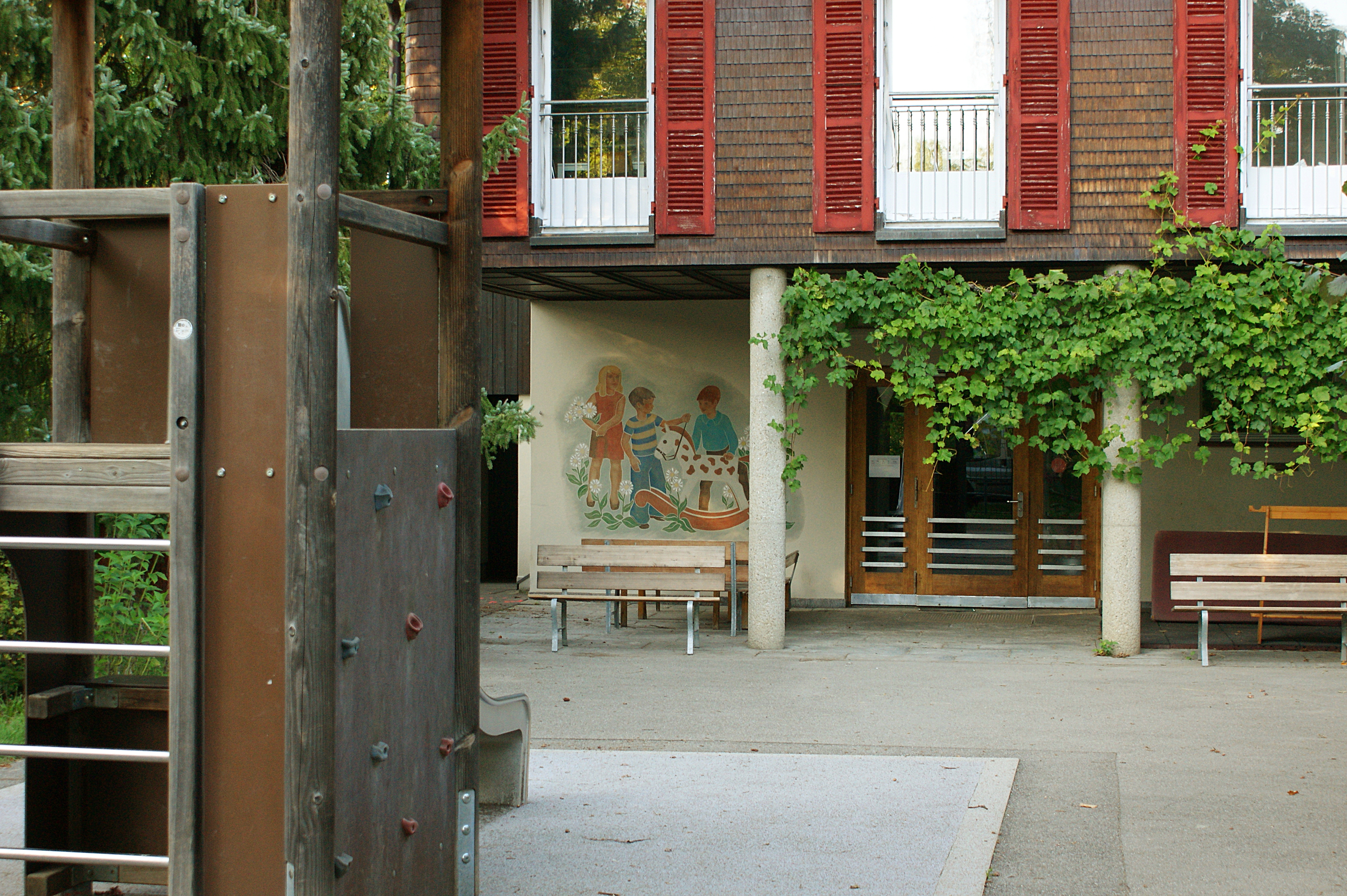 Situation Wandmalerei Spielende Kinder (Carl Bieri 1940)